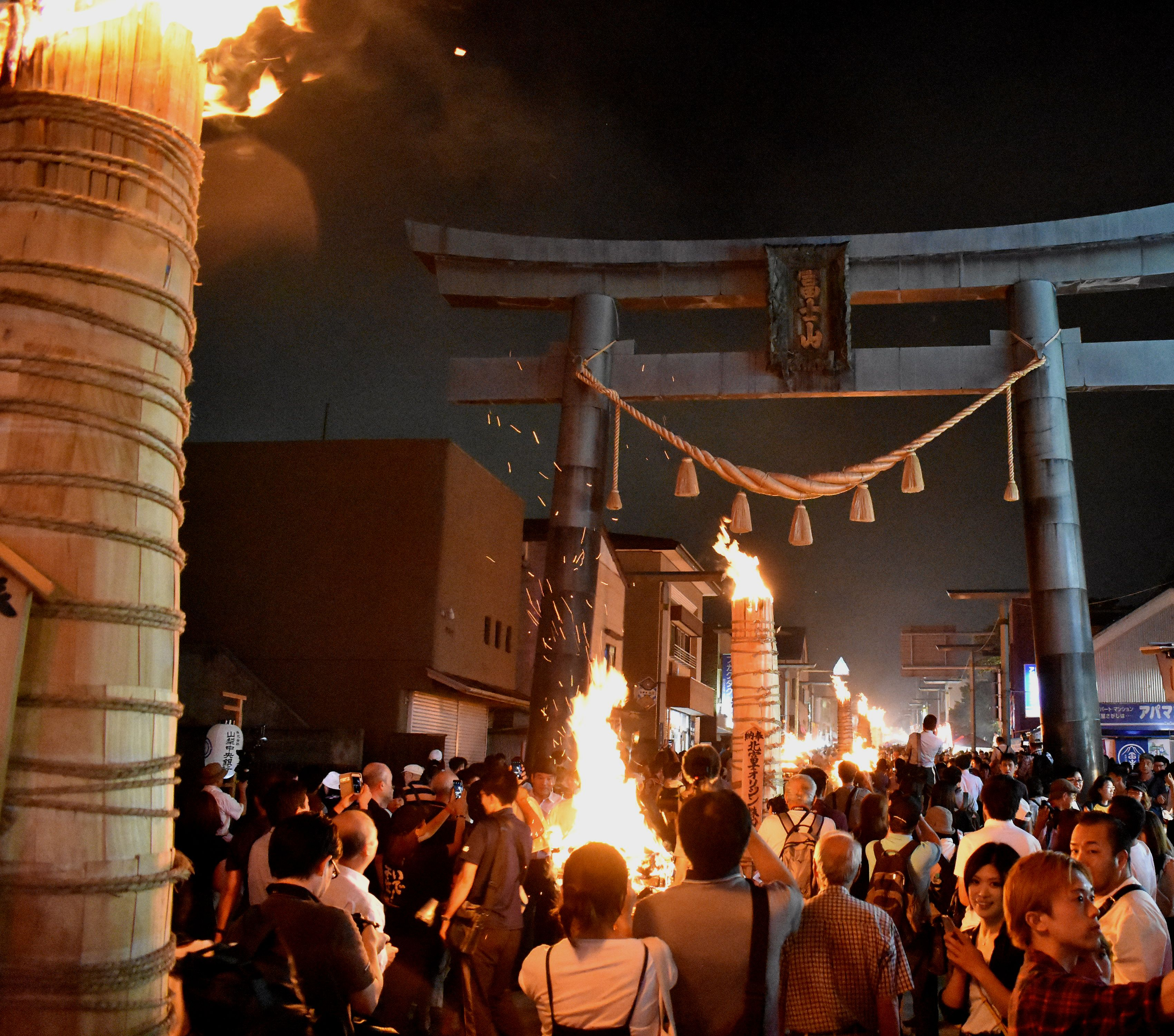 富士吉田市 吉田の火祭